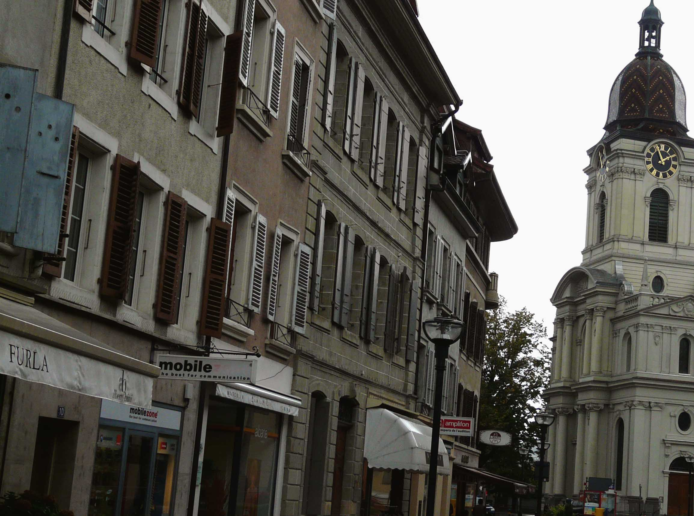 Morges, Canton de Vaud, Suisse, la Grand'Rue